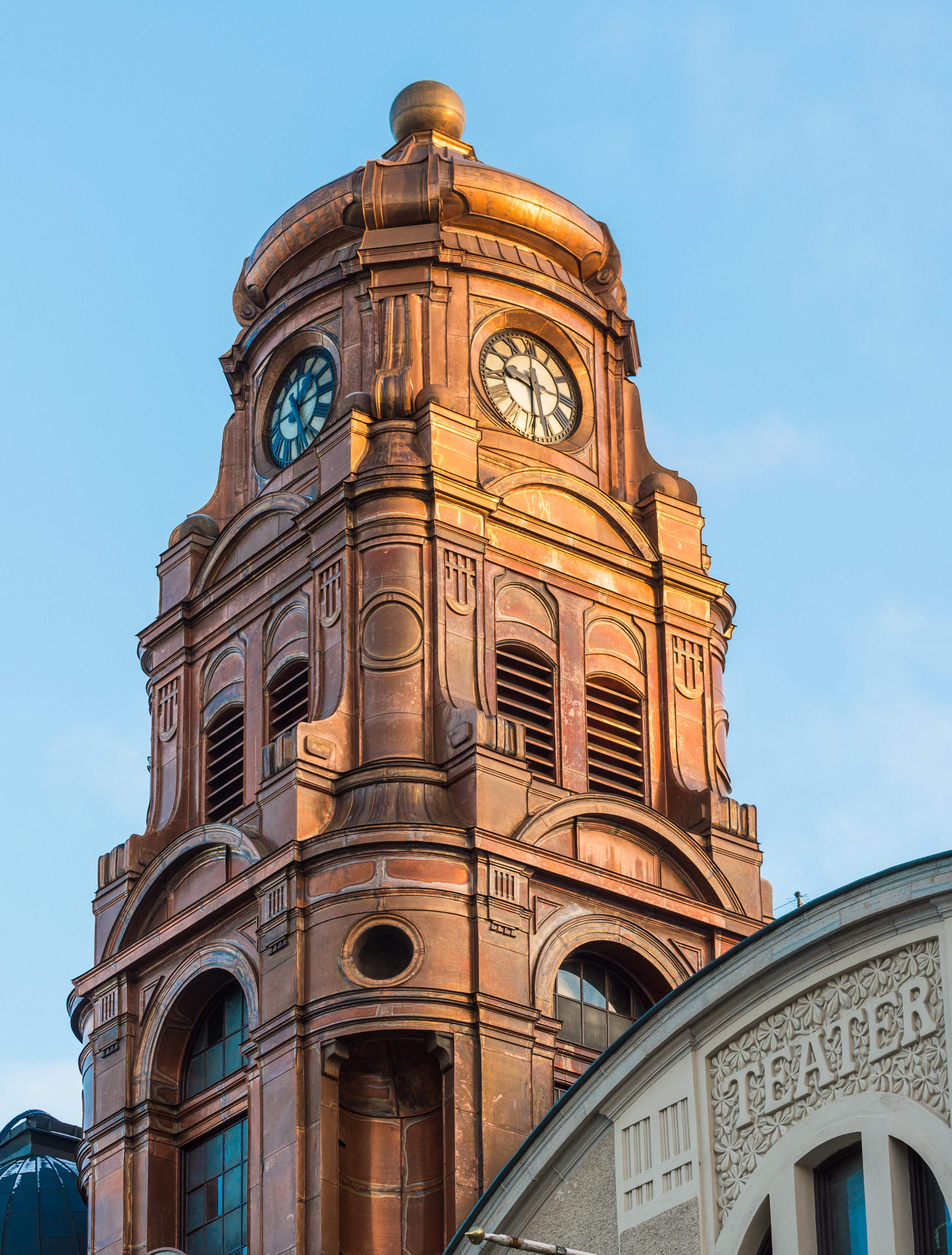 Koppartornet på Oscarsteatern i Stockholm efter omläggningen i januari 2016.